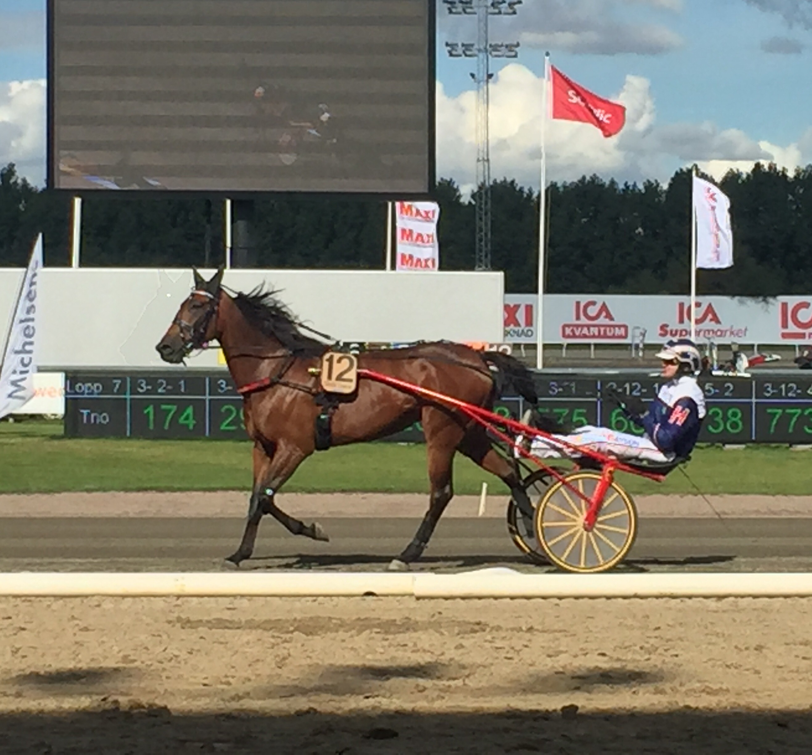 Kenneth Haugstad och hästen Caddie Lisieux (tränad av Roger Walmann) inför finalen av Derbystoet 2017.